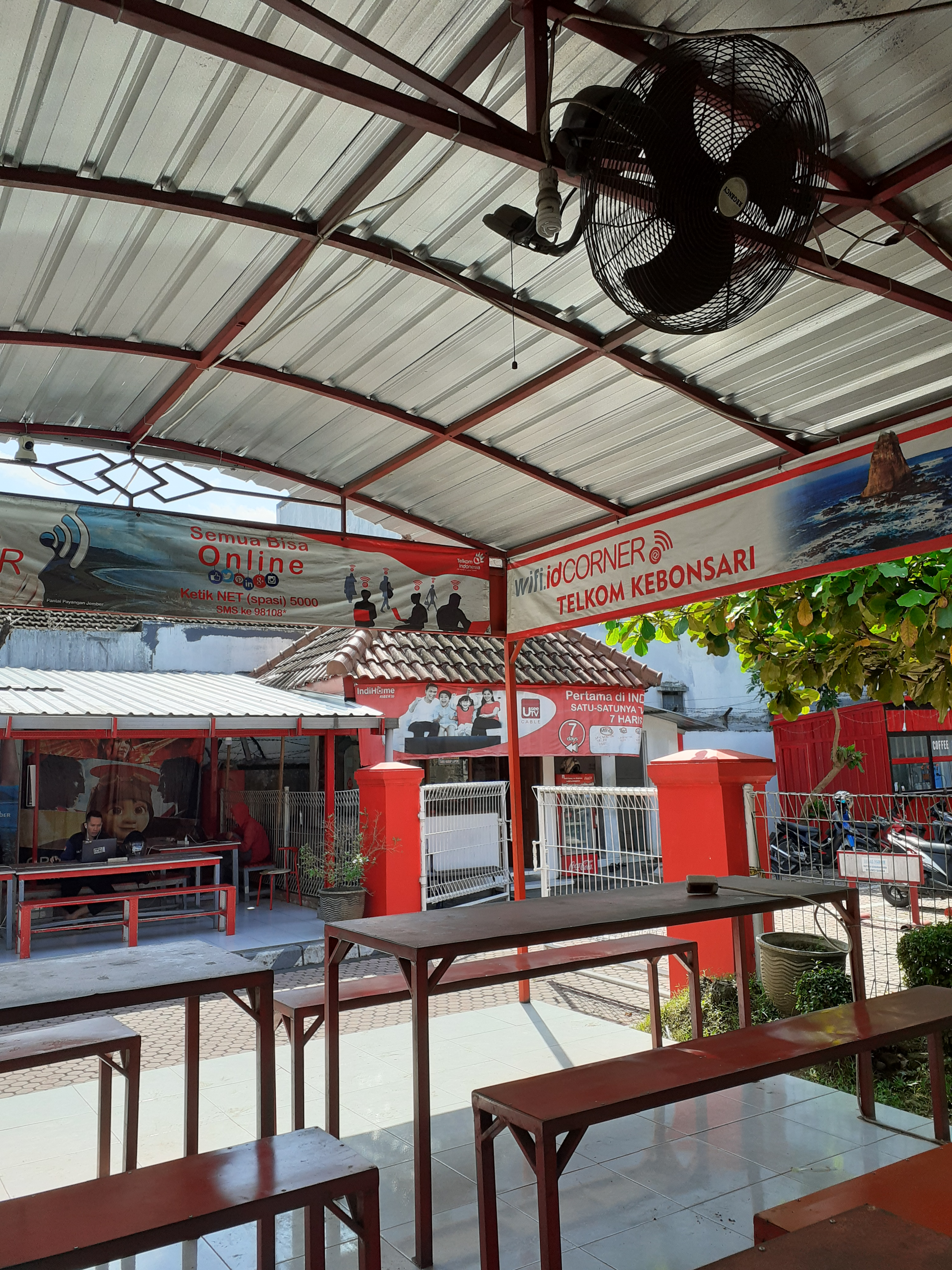 Sebuah tempat dimana pengguna dapat datang dan menikmati koneksi internet nirkabel, dengan membayar sejumlah biaya terlebih dahulu